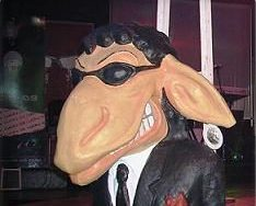 Trofeo de los Premios Lucas